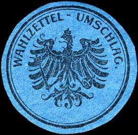 Sealing stamp Title: Wahlzettel - Umschlag Description: Briefsiegel, schwarz, blau Place: size: 3 cm